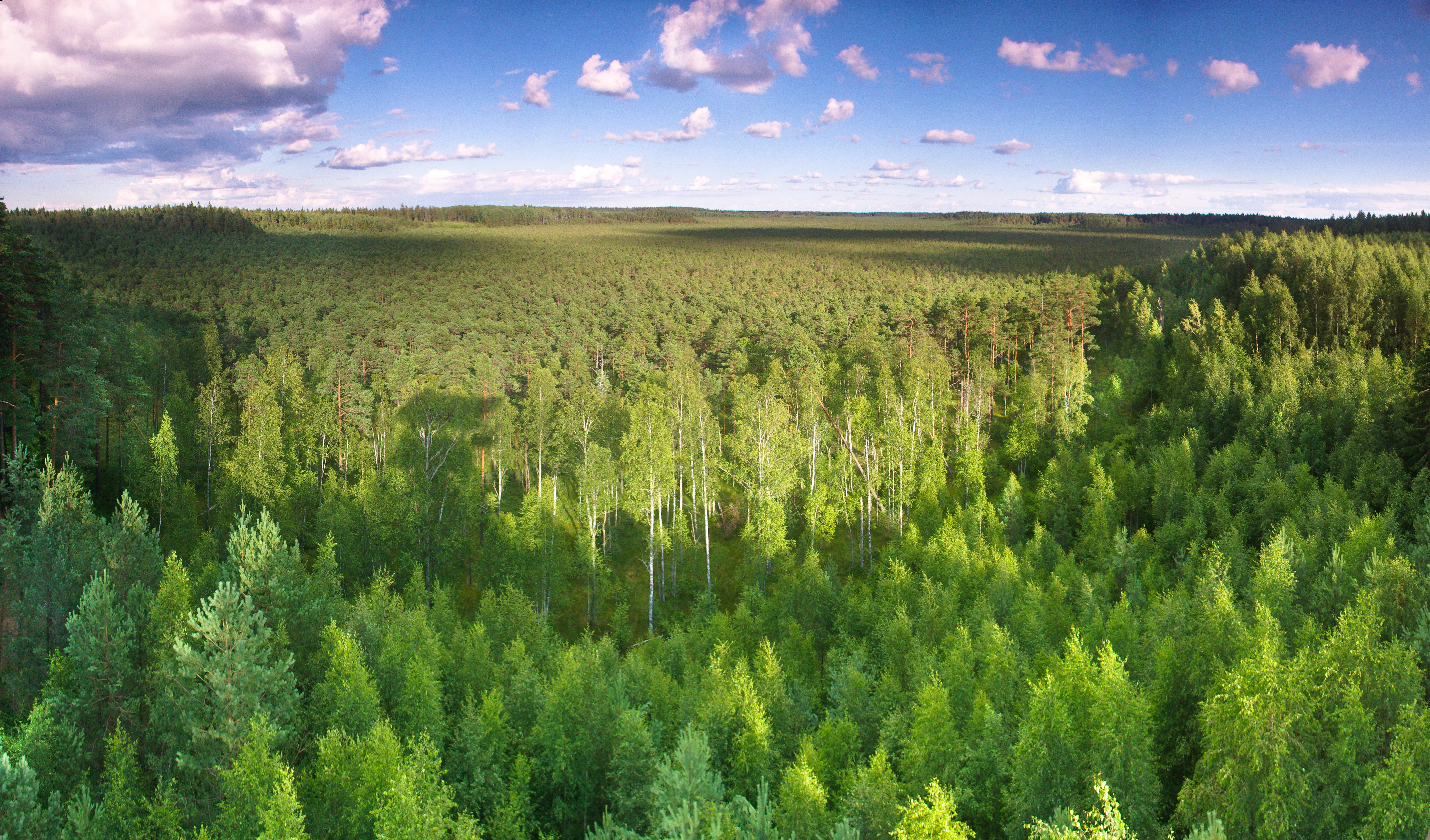 Vaade vaatetornist Valgesoo rabale. Geograafilised koordinaadid on 58°08'...58°09' N, 27°04'...27°06' E.